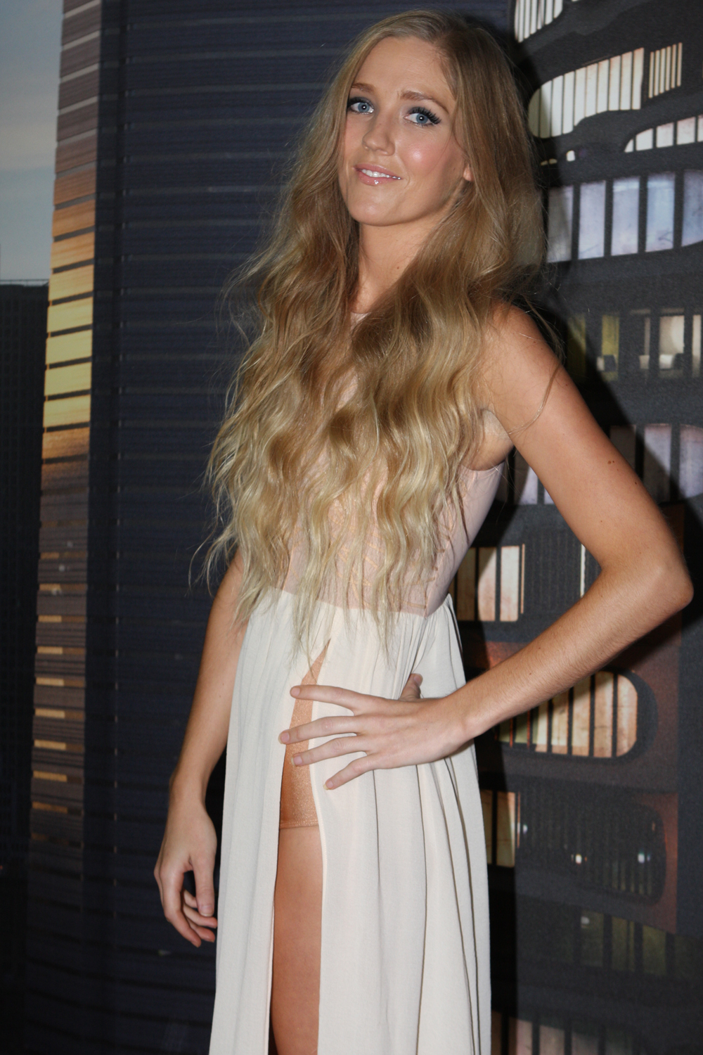 Star Trek Into Darkness Premiere